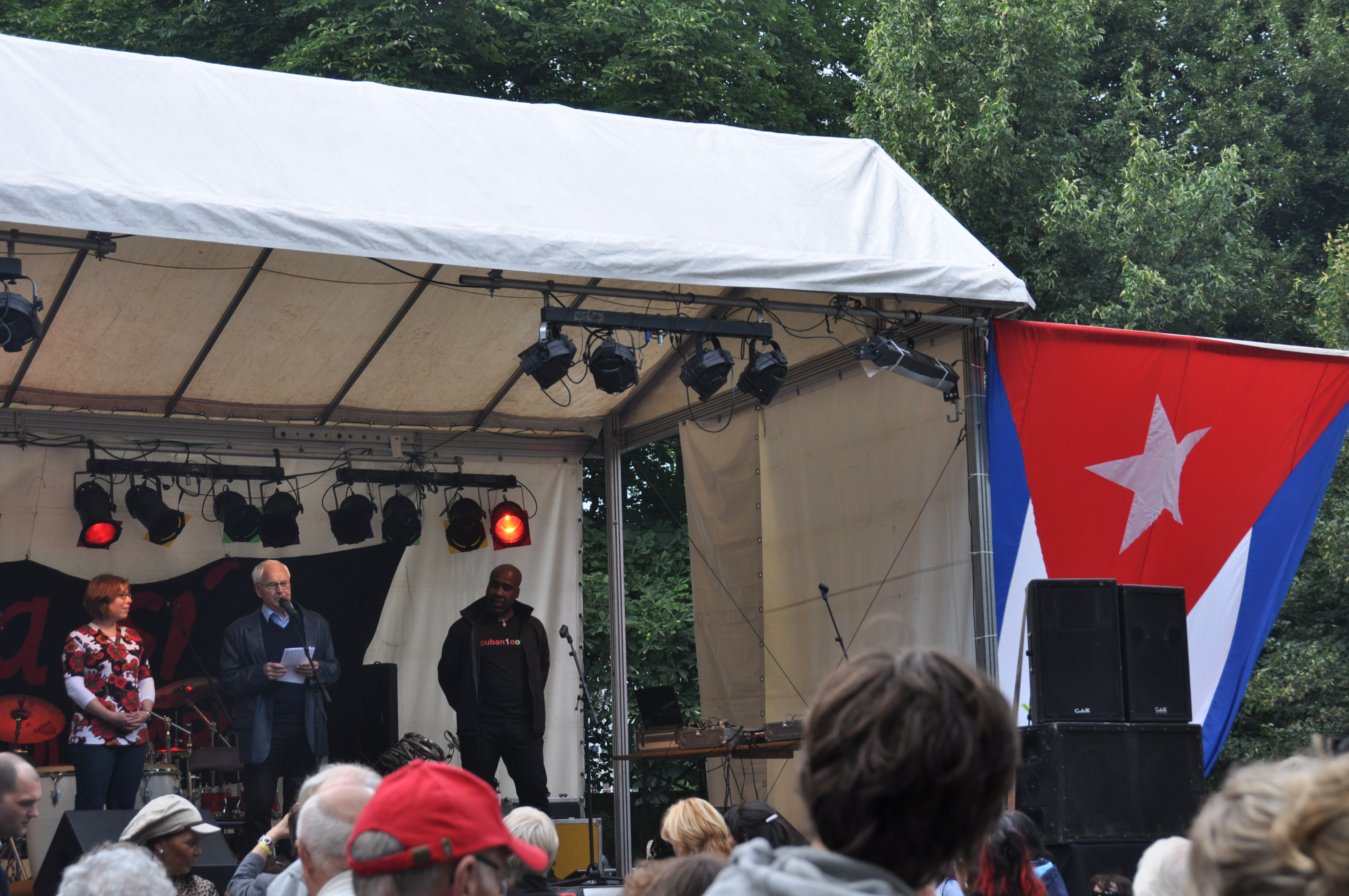 "20 Jahre Cuba Sí" Solidaritätsfest in Berlin 2011 mit Hans Modrow